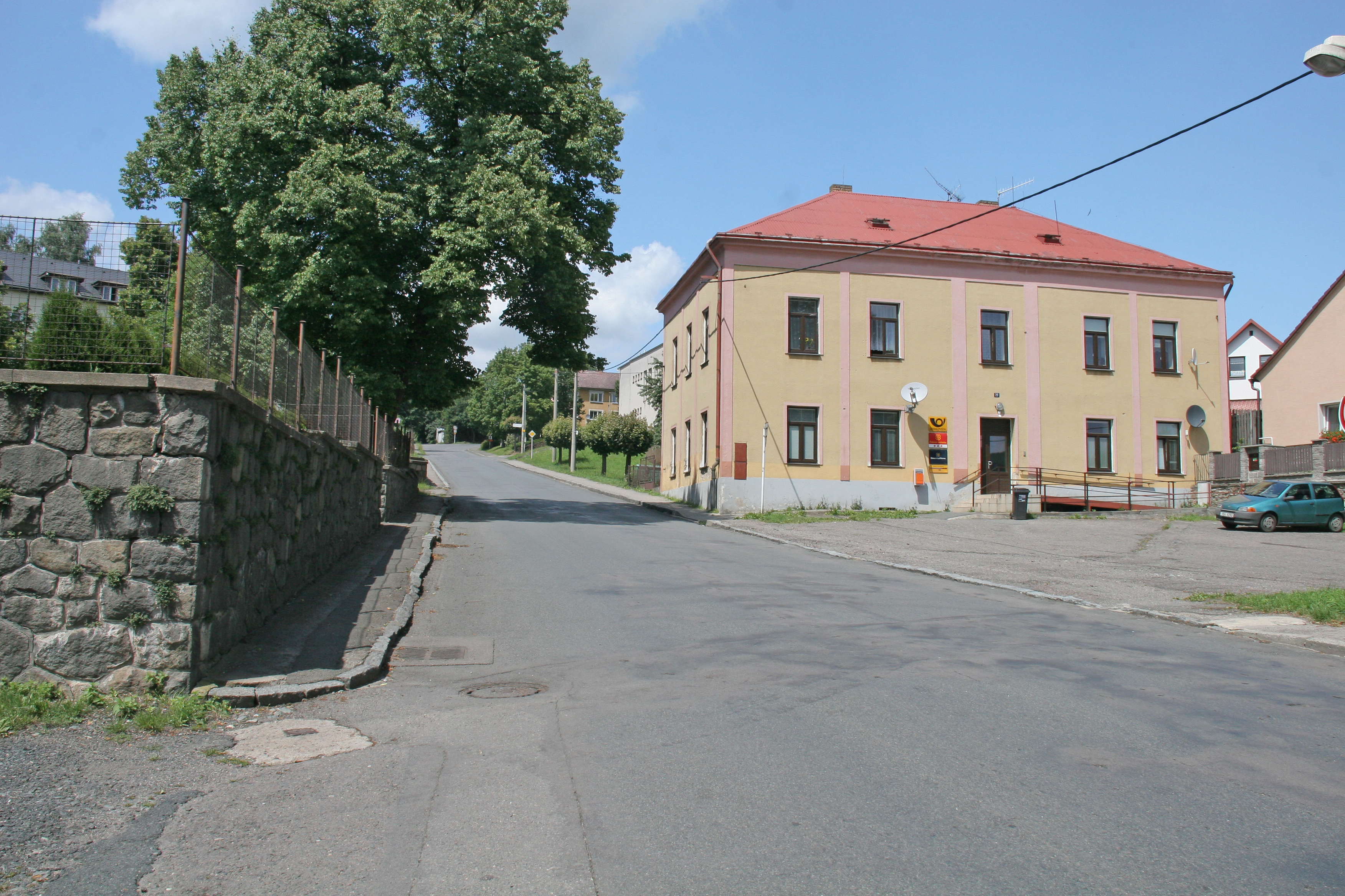 Prachovice pošta